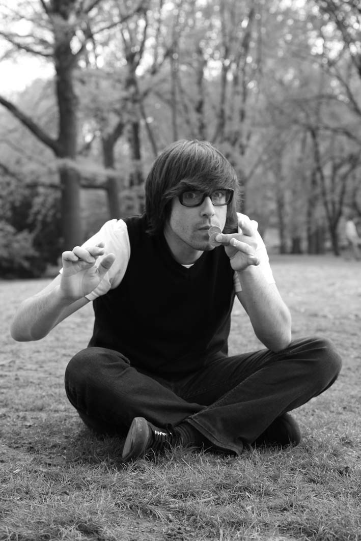 El humorista, mago y director español Luis Piedrahita